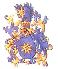 Barevný znak Sternbergů